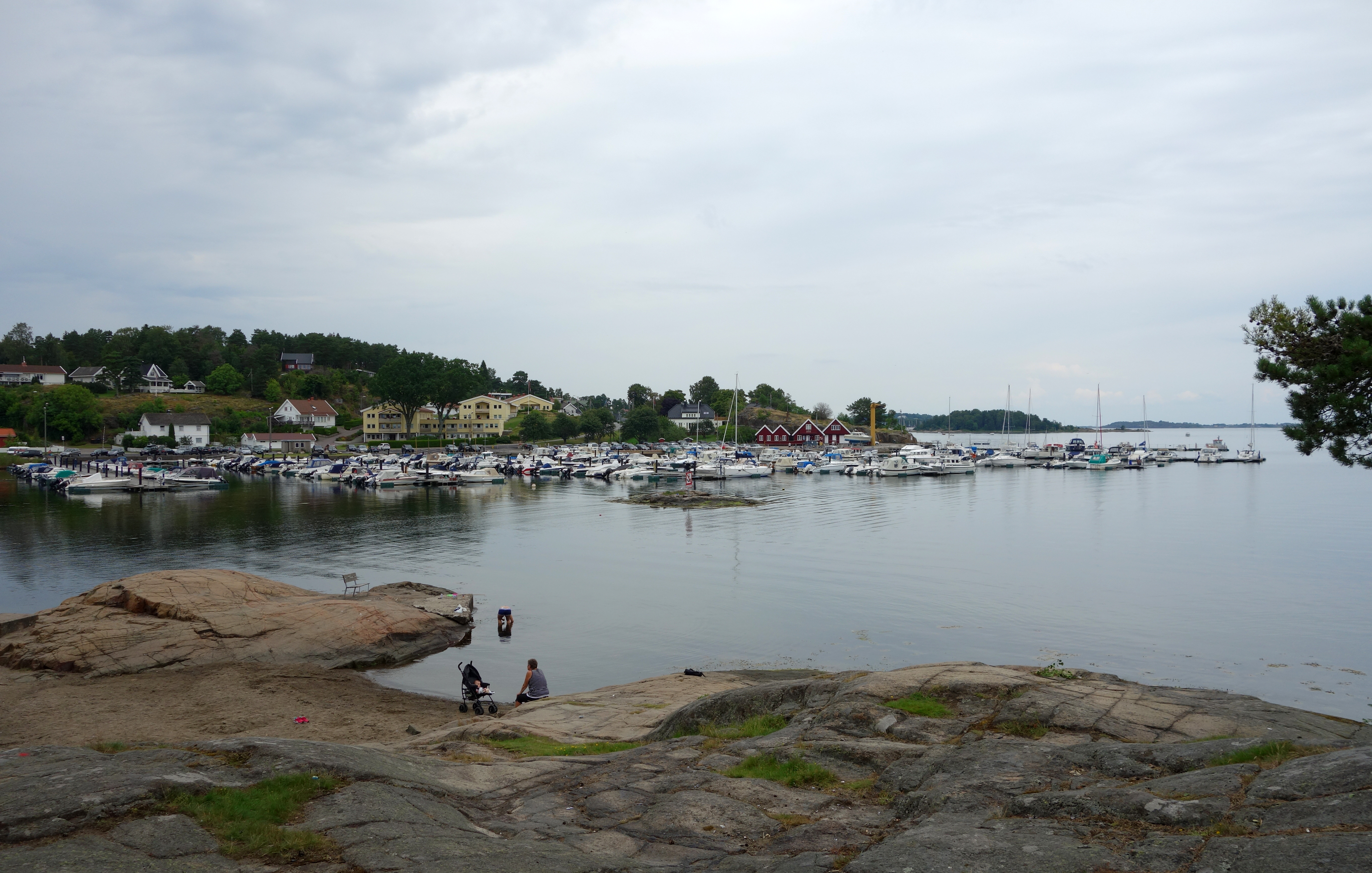 Knarberg på Nøtterøy, sett fra Ulvøtangen